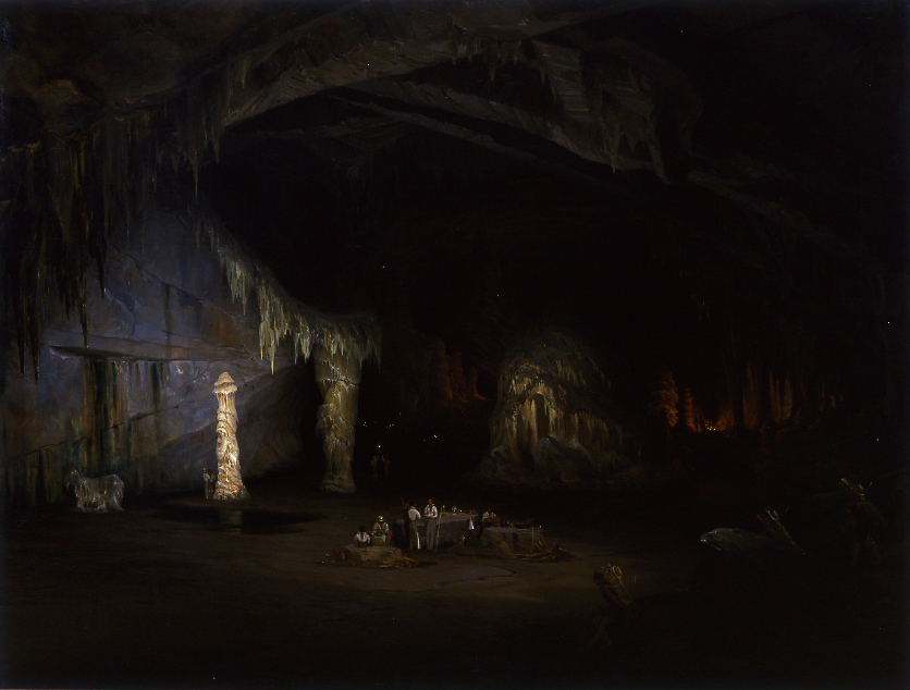 Las grutas de Cacahuamilpa de uno de los artistas viajeros: Barón Gros.